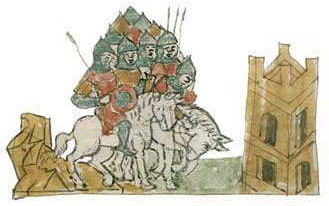 Беларуская (тарашкевіца): Мініятура Радзівілаўскага летапісу: Рагвалод-Барыс едзе на княжаньне ў Полацак